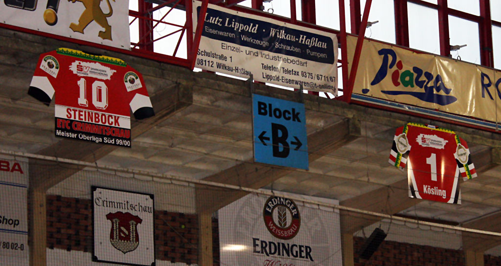 Die gesperrte Rückennummern des ETC Crimmitschau unter dem Hallendach